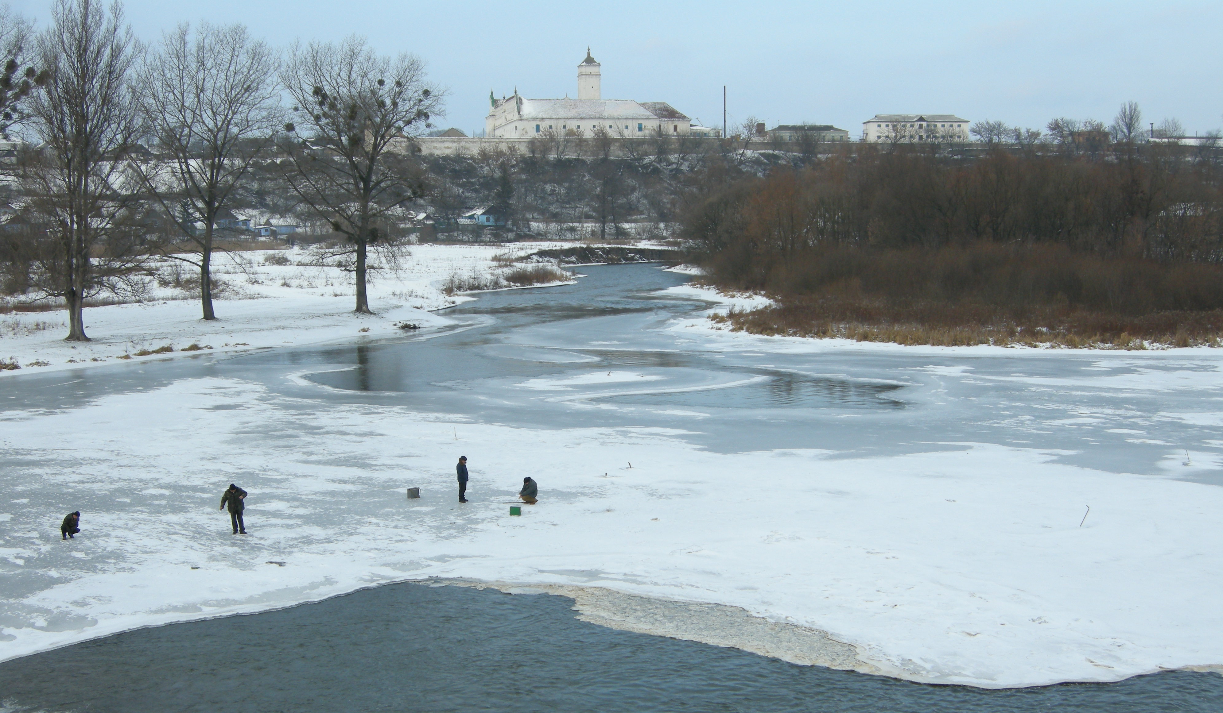 Річка Горинь у Заславі. Монастир Бернардинів.